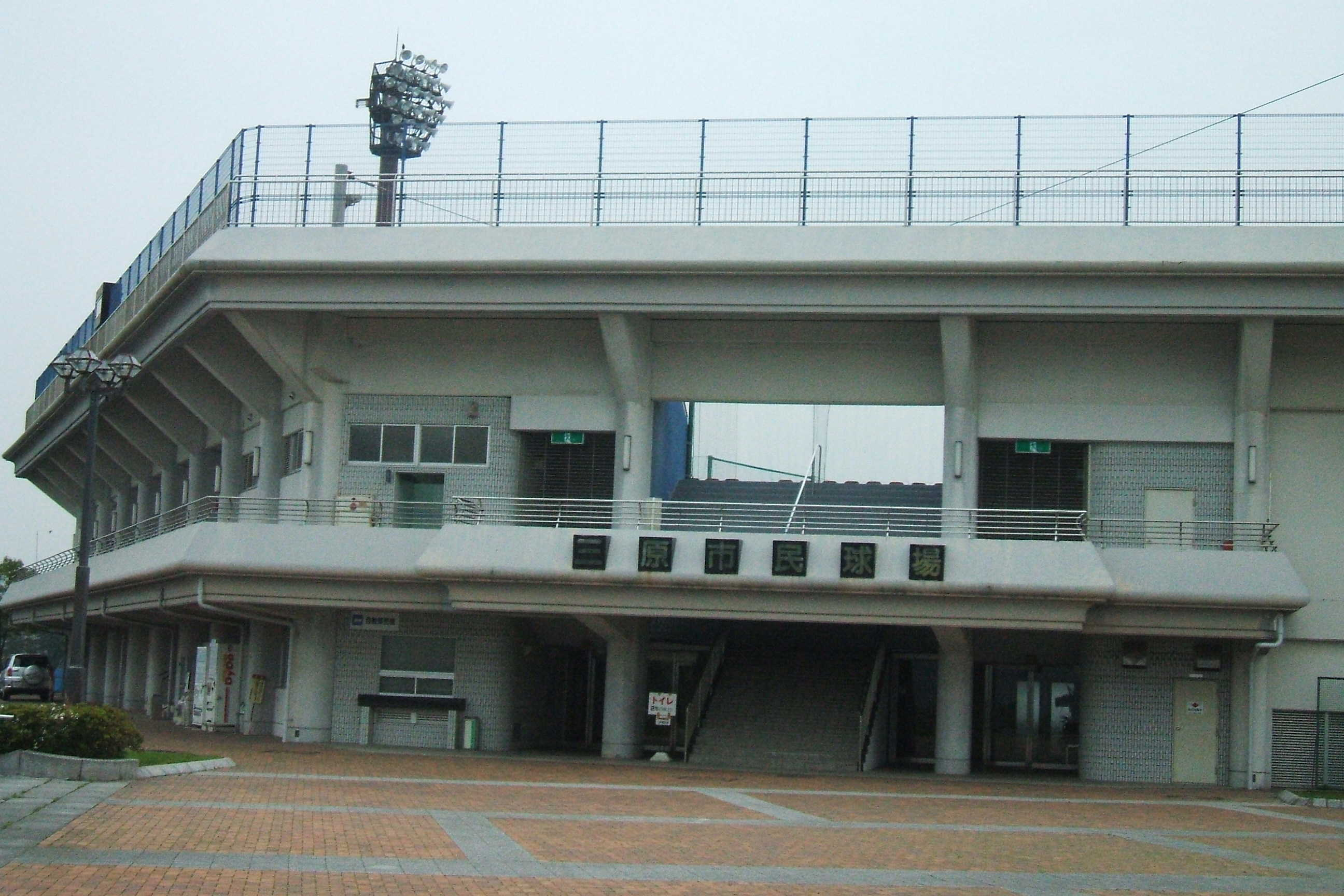 広島県三原市にある三原市民球場の外観